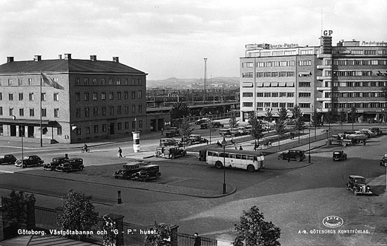 Västgötabanans stationshus vid Åkareplatsen i Göteborg. Vykort från 1935.